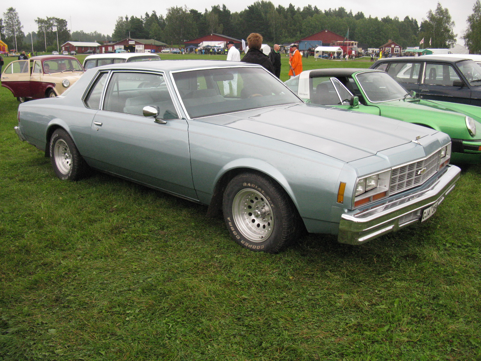 Chevrolet Impala Coupé 1977